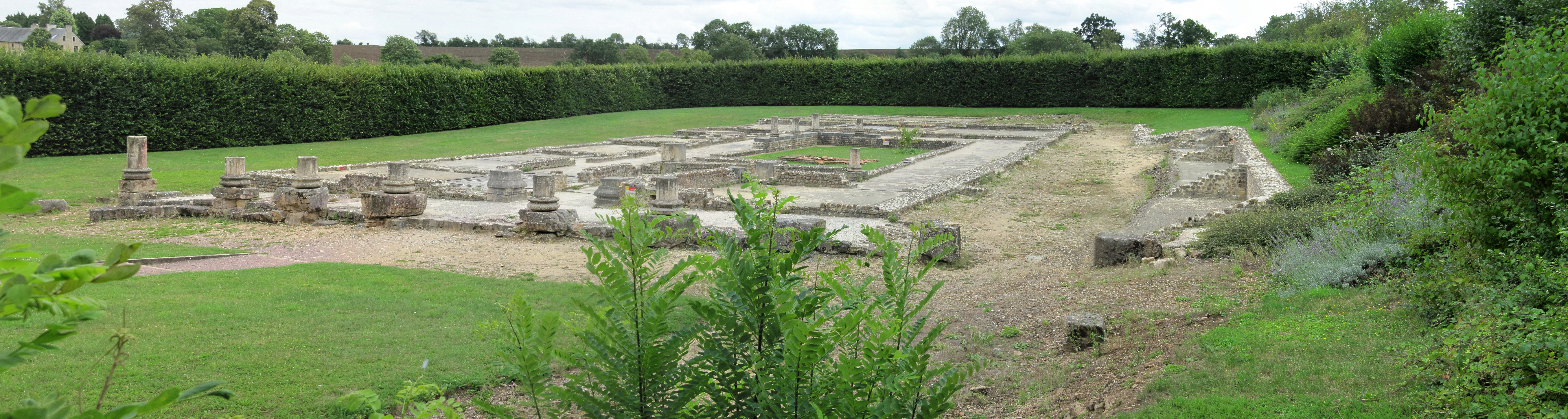 Maison au Grand Péristyle à Vieux-la-Romaine , vue panoramique